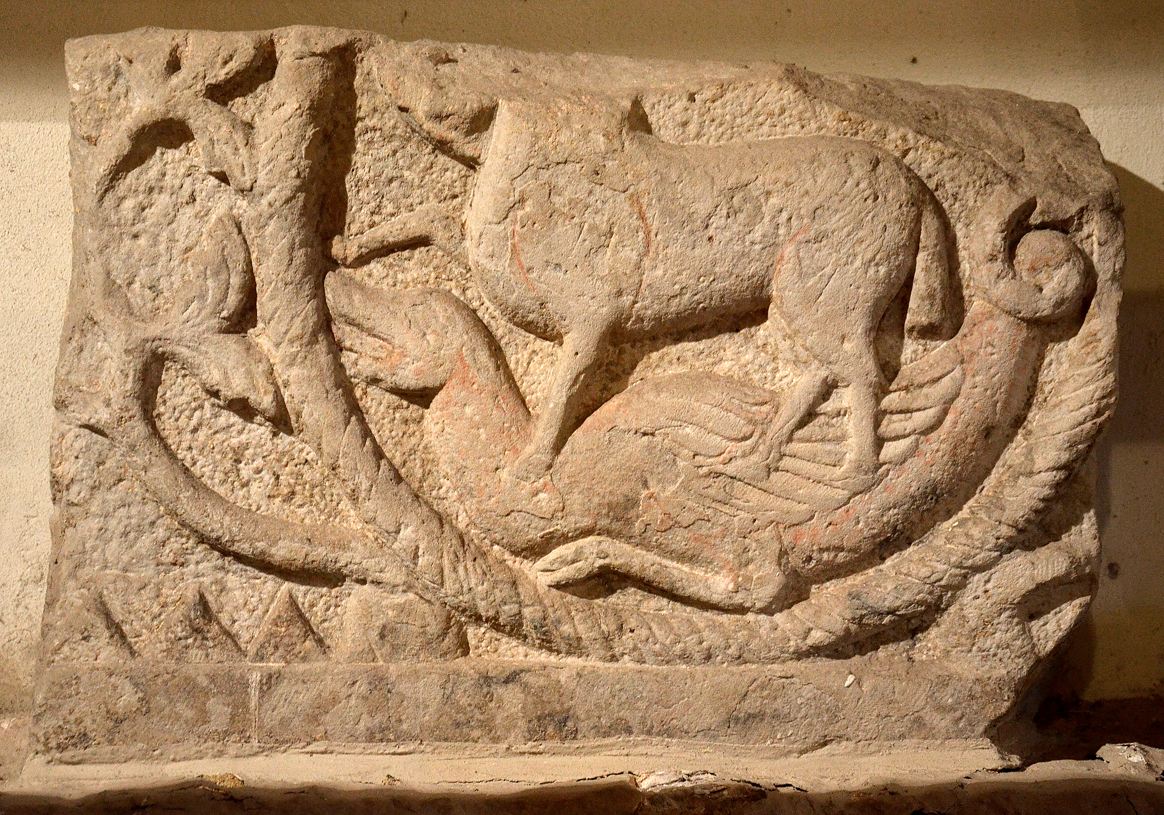 Dieser Rest eines Tympanon aus der um das Jahr 796 errichteten ersten Hallenkirche (an Stelle der heutigen St. Alexandri-Kirche) in Eldagsen zeigt ein Motiv aus der in der Bibel niedergeschriebenen Offenbarung des Johannes: Das Lamm Gottes bezwingt (überwindet) einen geflügelten Lindwurm, die "Hure Babylons", Sinnbild für das Böse. Außerhalb des strickförmigen Ringes, der das Lamm und den Lindwurm umrandet, sind beiderseits Bäume angeordnet, die für den Baum des Lebens und den Baum der Erkenntnis stehen ...